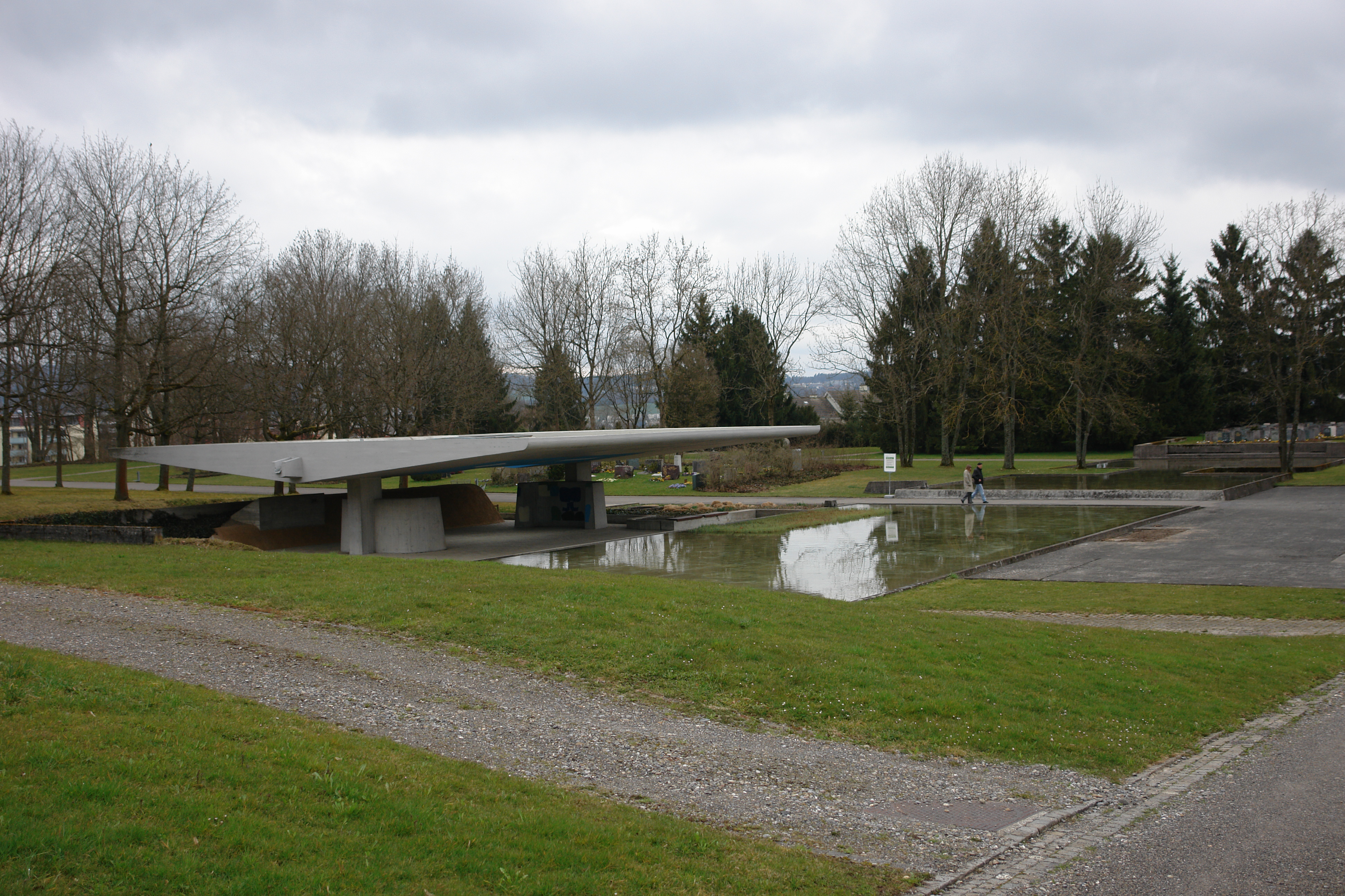 Der Pavillon oder Unterstand am Teich nahe dem Nordwesteingang des Friedhofs Eichbühl, Zürich, Schweiz. Mitte der 1960er Jahre